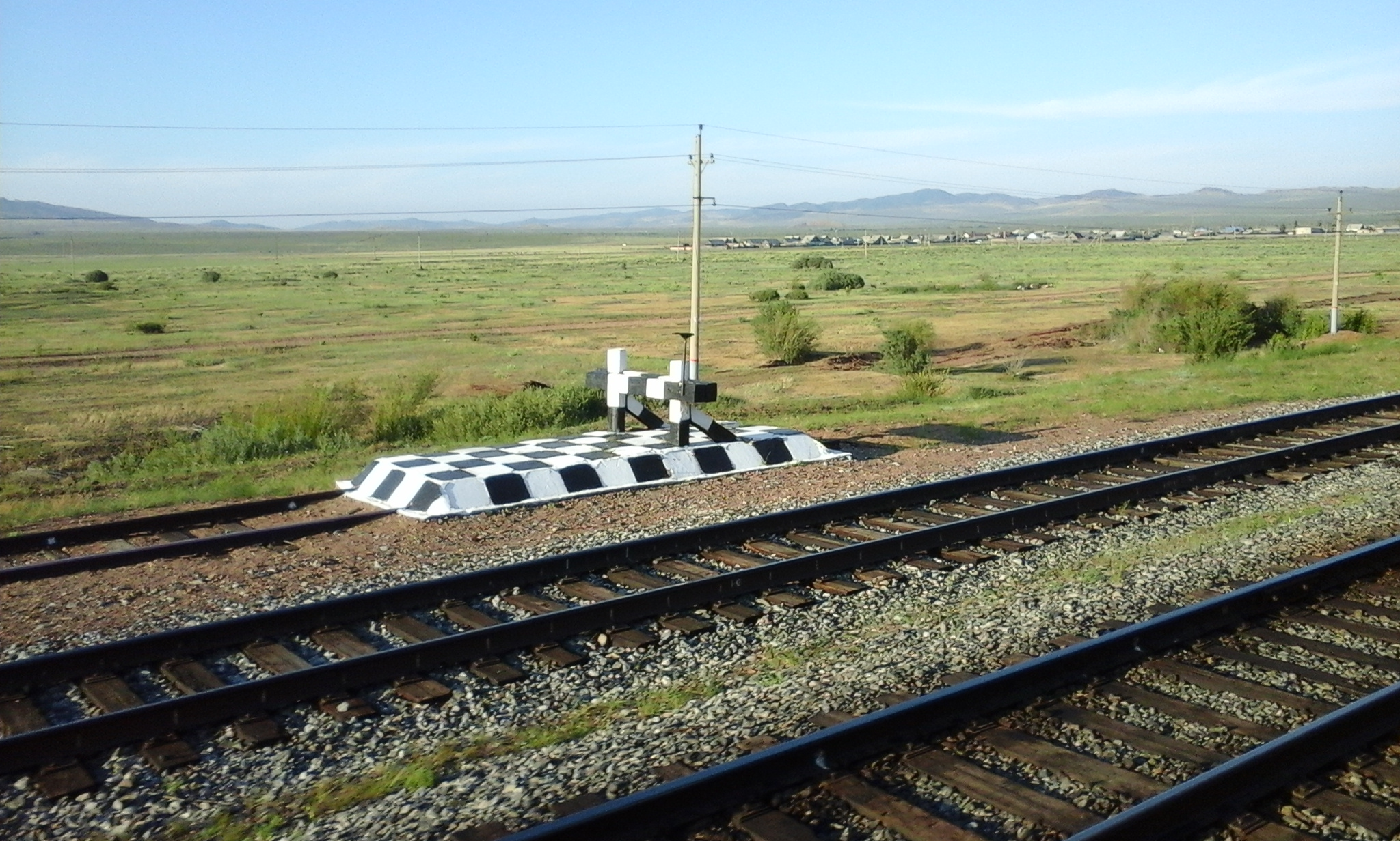 Prellbock in Russland an der Transsibirischen Eisenbahn